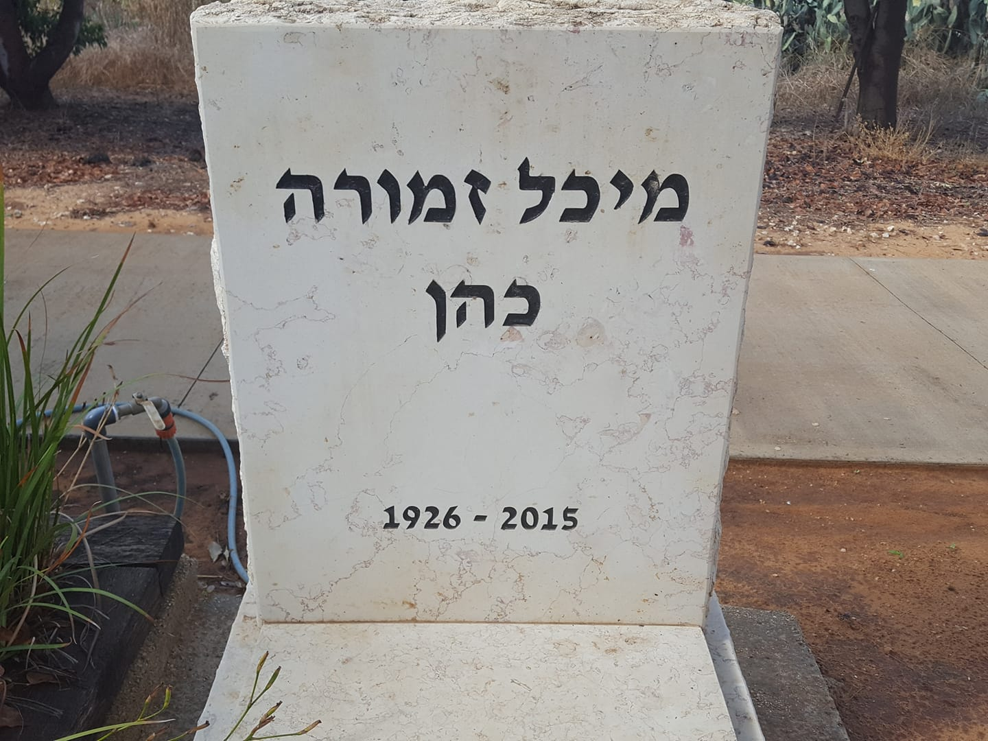 קברה של המוסיקולוגית מיכל זמורה כהן בבית העלמין בשפיים צילום אלי אלון